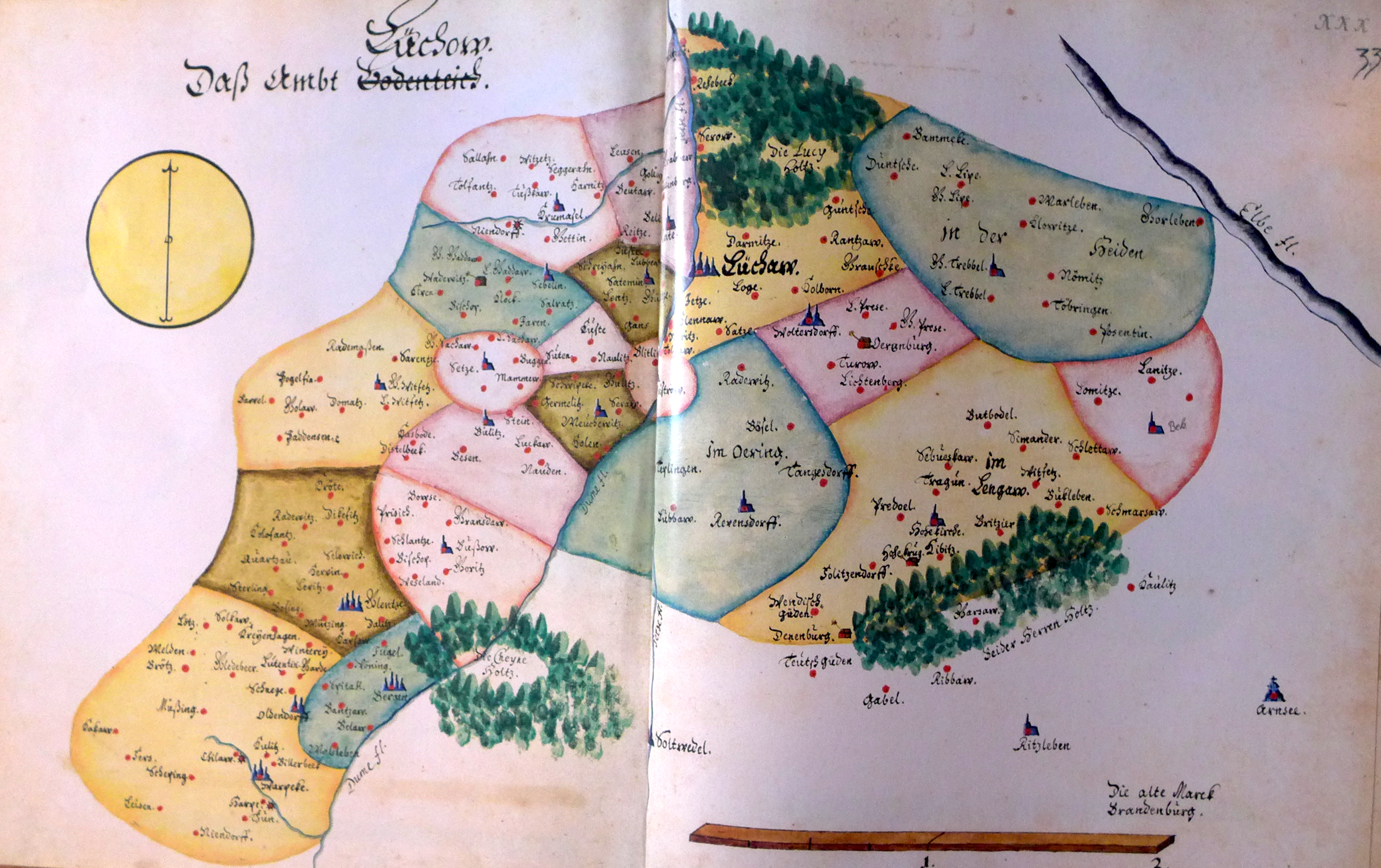 Ämteratlas des Fürstentums Lüneburg von Johannes Mellinger, um 1600 – Reproduktion der im Niedersächsischen Landesarchiv, Abteilung Hannover, lagernden Kopie um 1678 (vgl.